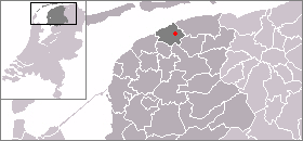 Locatie van Hegebeintum (Hogebeintum) aangegeven binnen de gemeente Ferwerderadiel.